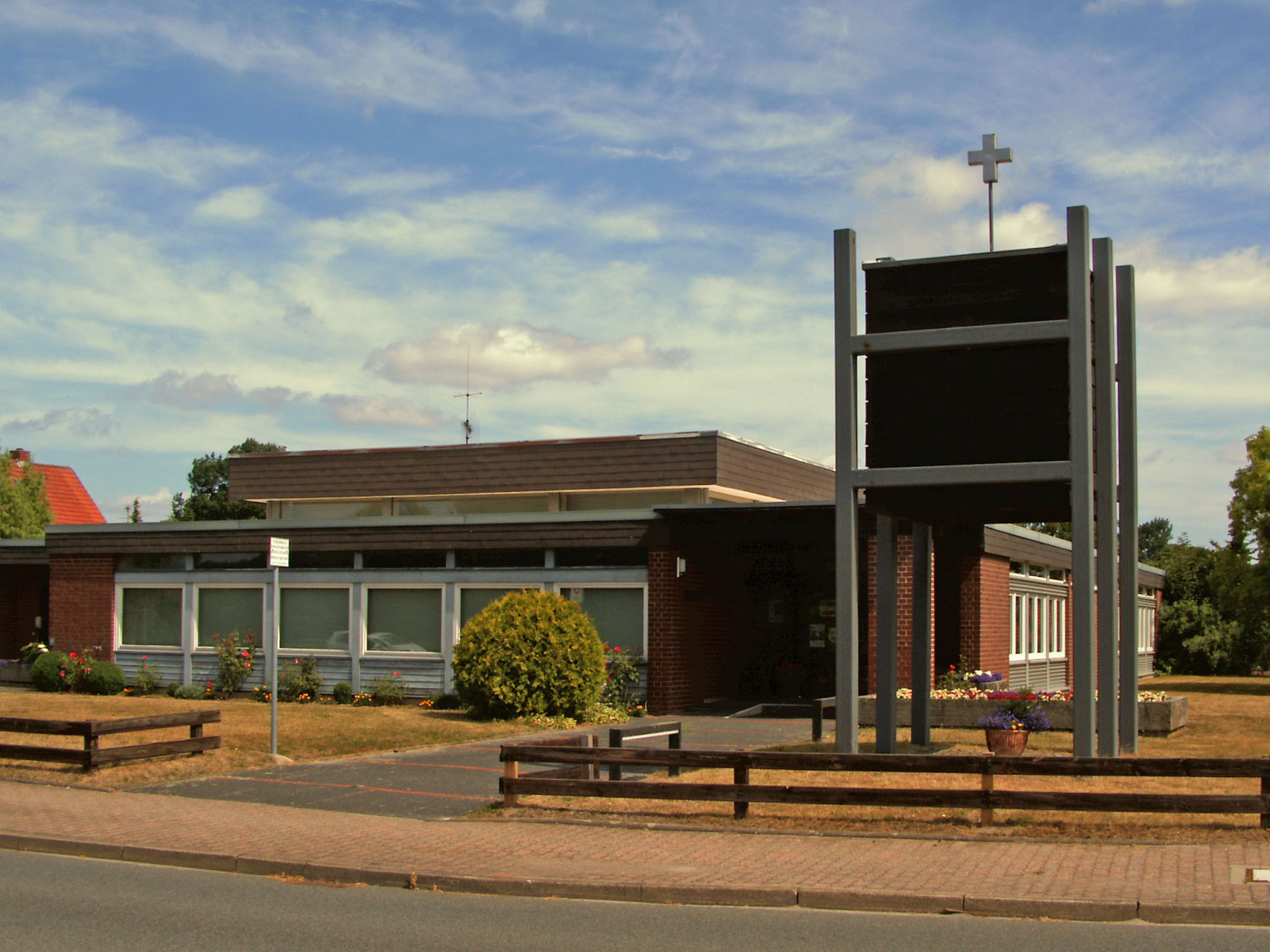 Evangelisch-lutherische Heiliggeistkirche in Wendschott, Stadtteil von Wolfsburg